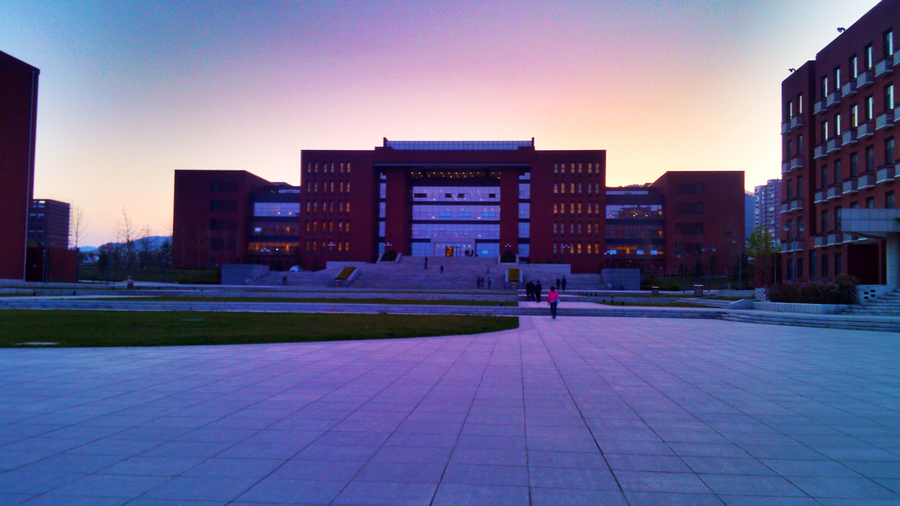 从东向西拍摄的大连理工大学令希图书馆